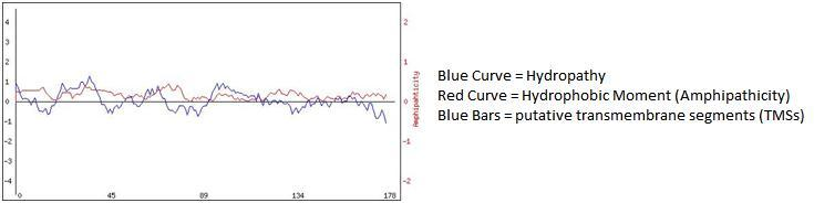 Hydropathy Plot for C11orf73